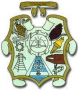 Escudo de Armas de Rio Bravo Tamaulipas